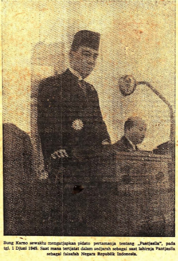 Menjadi cover pada majalah "Bina Pantjasila" tanggal 25 Februari 1966